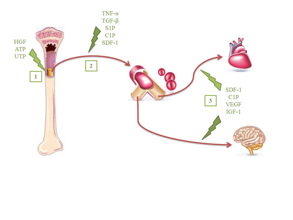 Route waarlangs stamcellen naar een weefsel migreren en groeifactoren en cytokines die het proces stimuleren. 1. proliferatie van stamcellen in het beenmerg 2. migratie naar de bloedbaan 3. Integratie in het doelweefsel (bv. hart of hersenen)